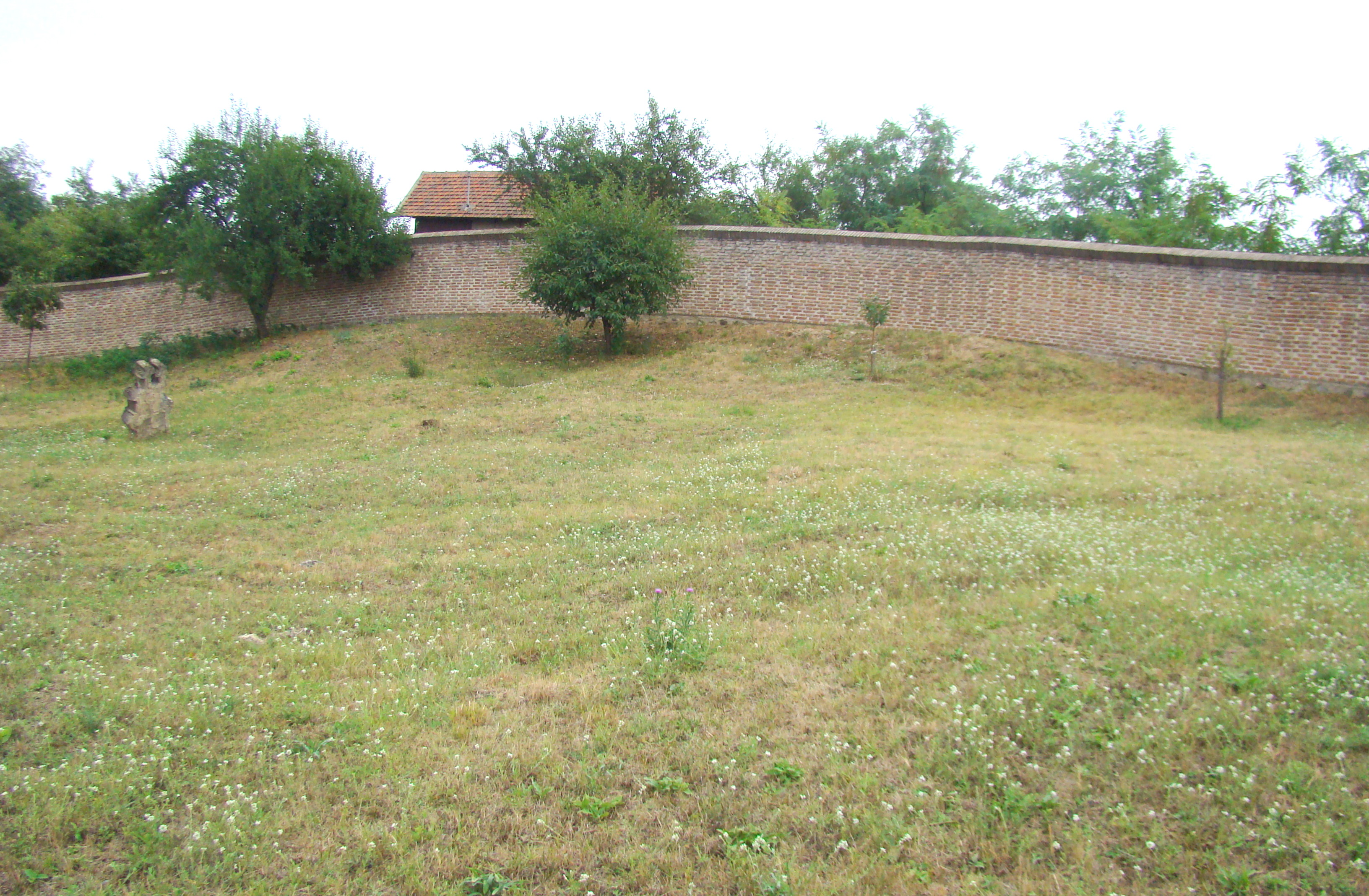 Zid de incintă, sat Cerneți; comuna Șimian 02